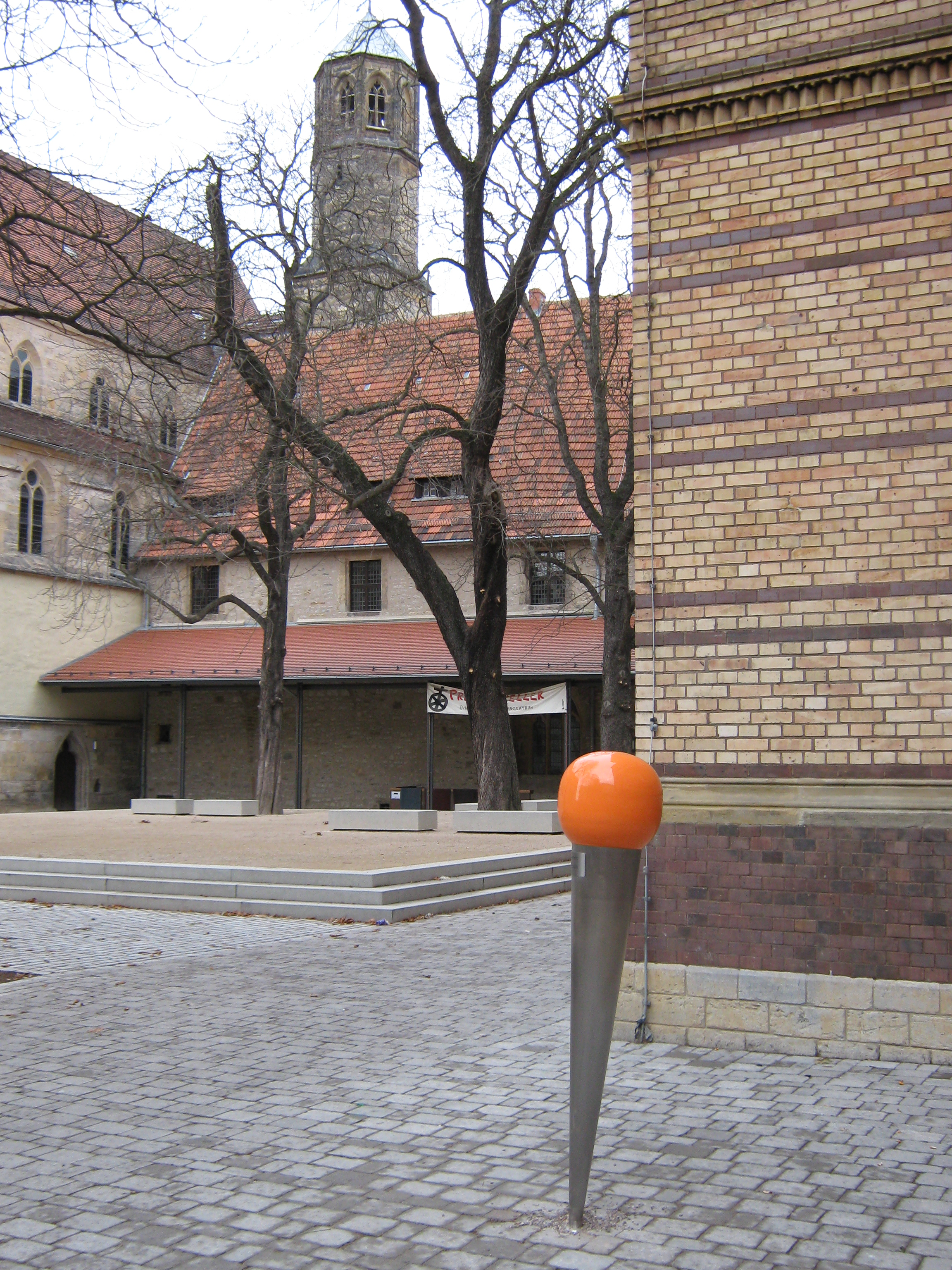 DenkNadel für die ermordete Schülerin Naomi Rosenblüth, aufgestellt am 9.11.2011 beim Evangelischen Ratsgymnasium Erfurt (Deutschland)